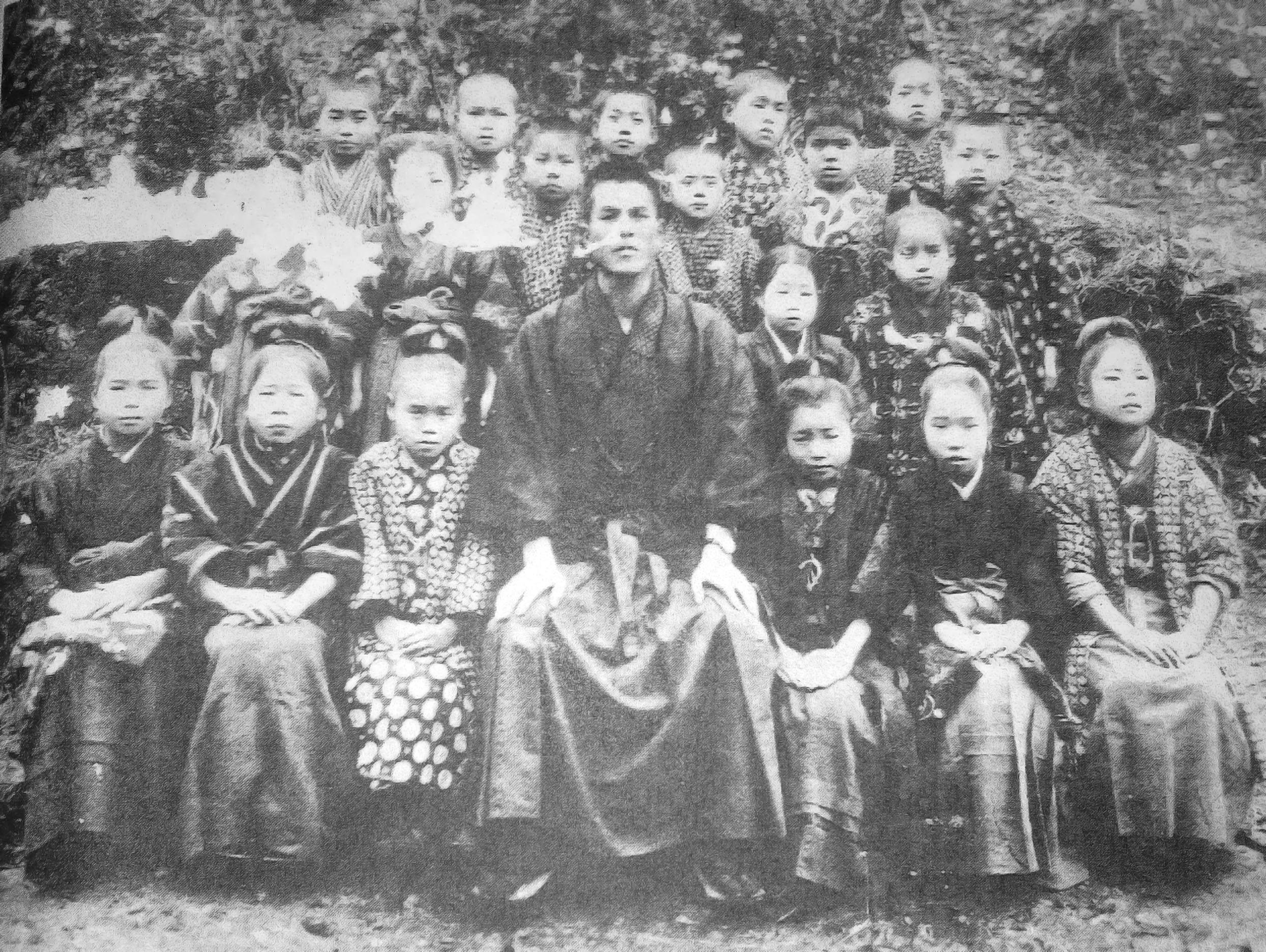 大正10年頃（1921年）に犬鳴分校で撮影された、児童と教職員の記念写真。